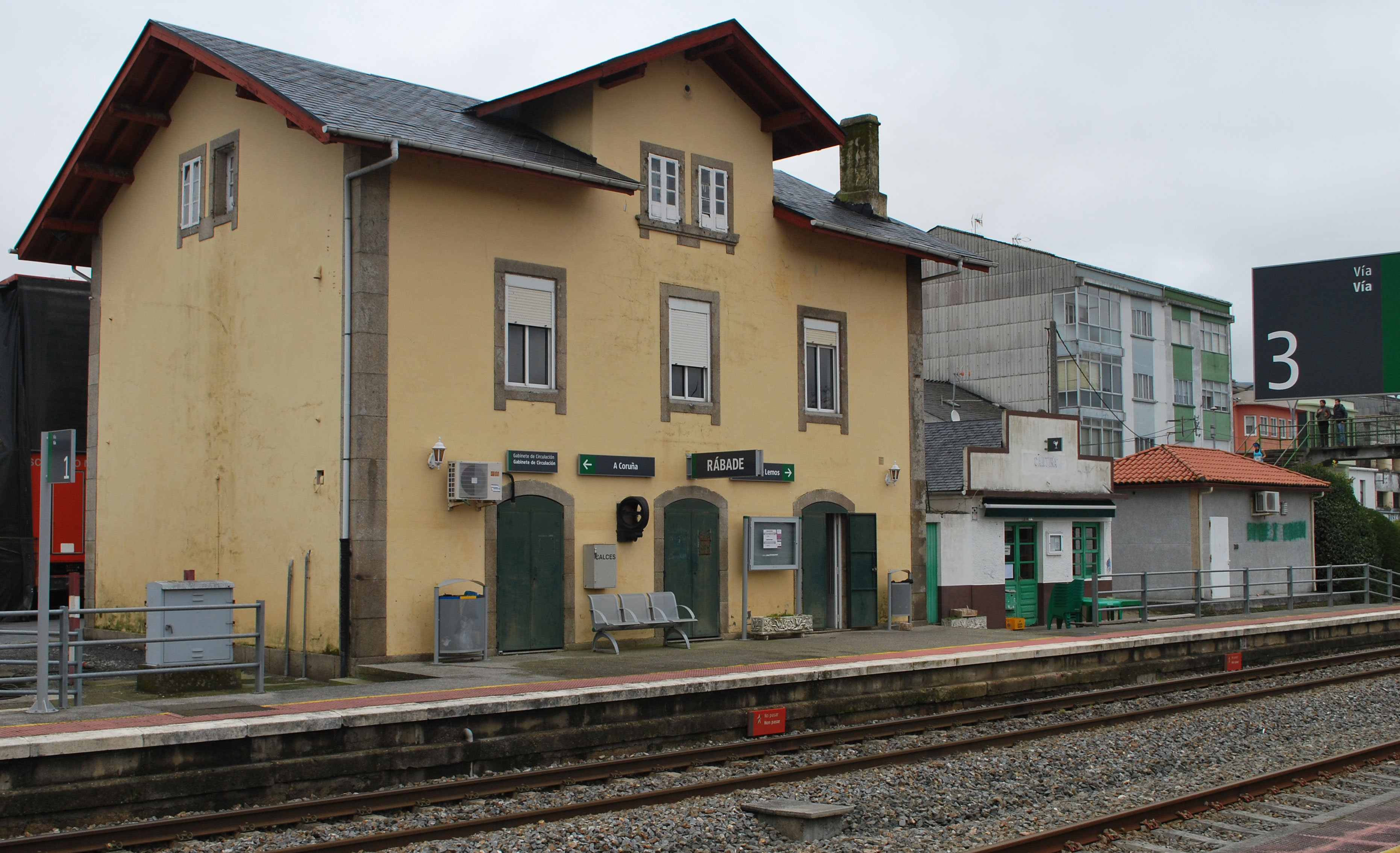 Vista da estación de Rábade en la provincia de Lugo, Galiza.